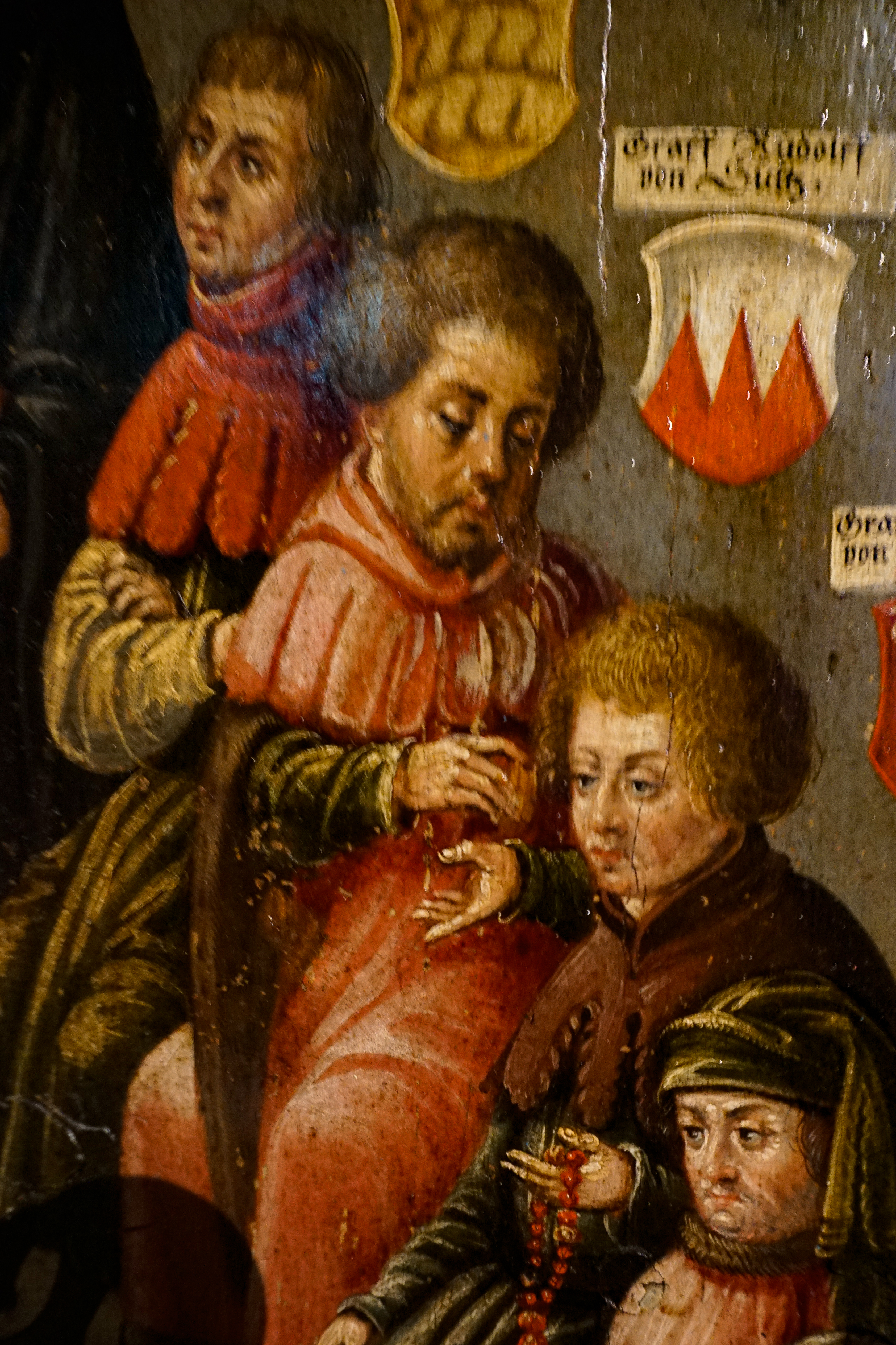 Kunstkammer im Landesmuseum Württemberg, Stuttgart: Ratssitzung Graf Eberhard III., Stuttgart, um 1580, Detail: von links nach rechts: Graf Friedrich von Helfenstein, Graf Eberhard von Nellenburg, Graf Rudolf von Sulz, Graf Eberhard von Werdenberg